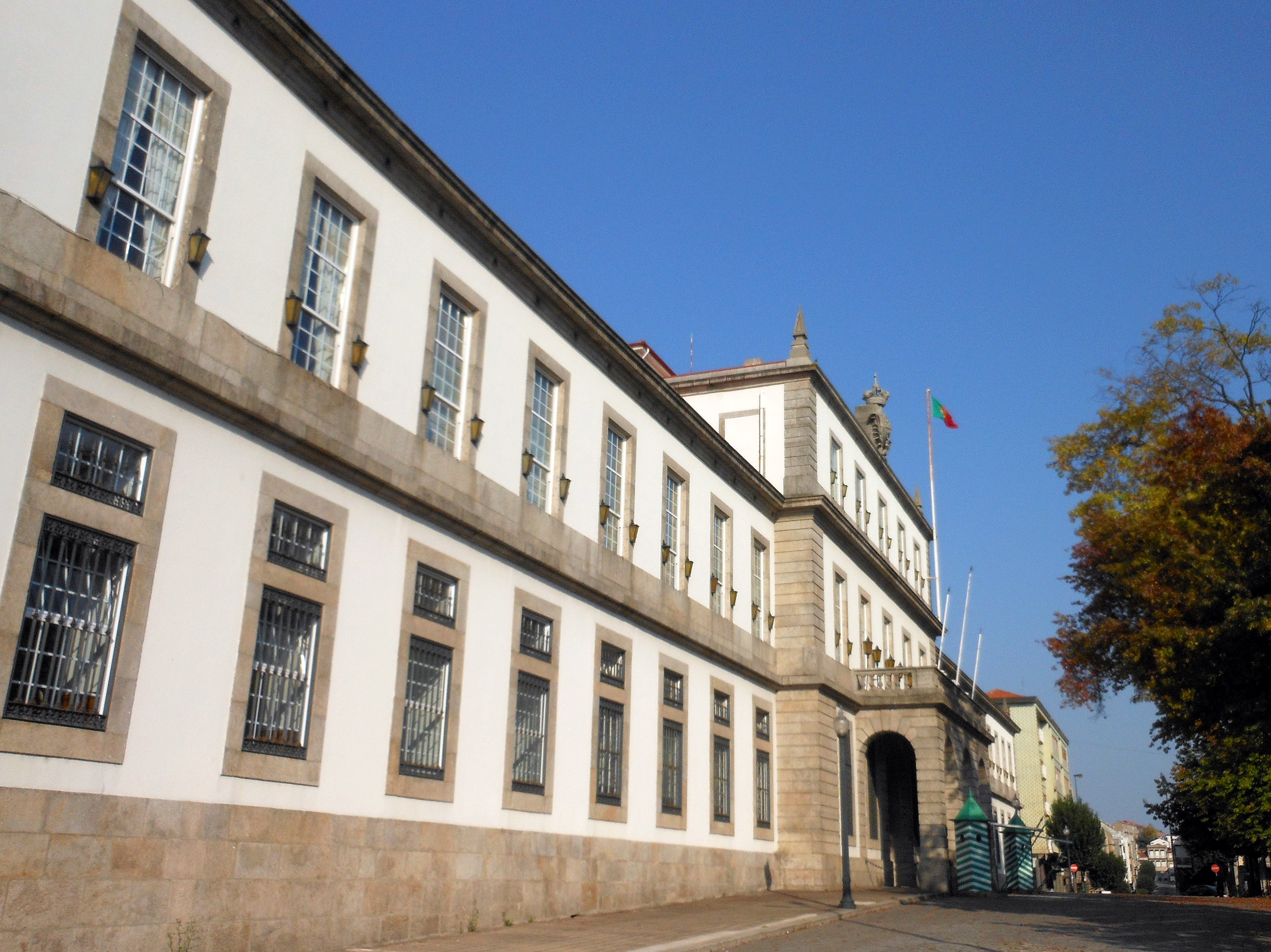 Quartel de Santo Ovídio, na Praça da República, Porto, Portugal.